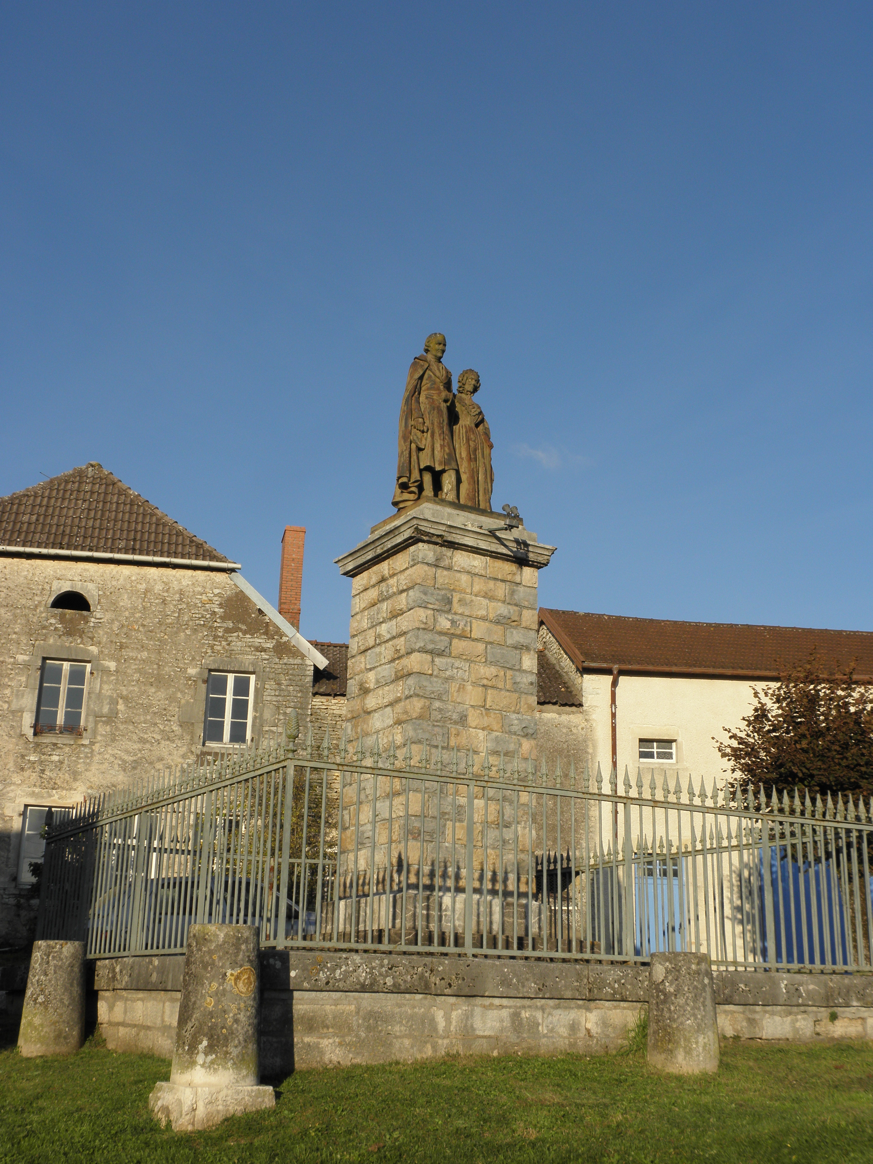 VALAY le monument PETREMAND